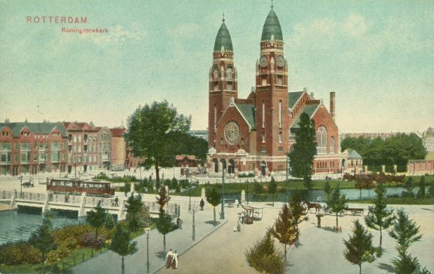 Koninginnekerk (1904-1971) aan de Boezemsingel te Rotterdam Crooswijk/Kralingen met Boezembrug